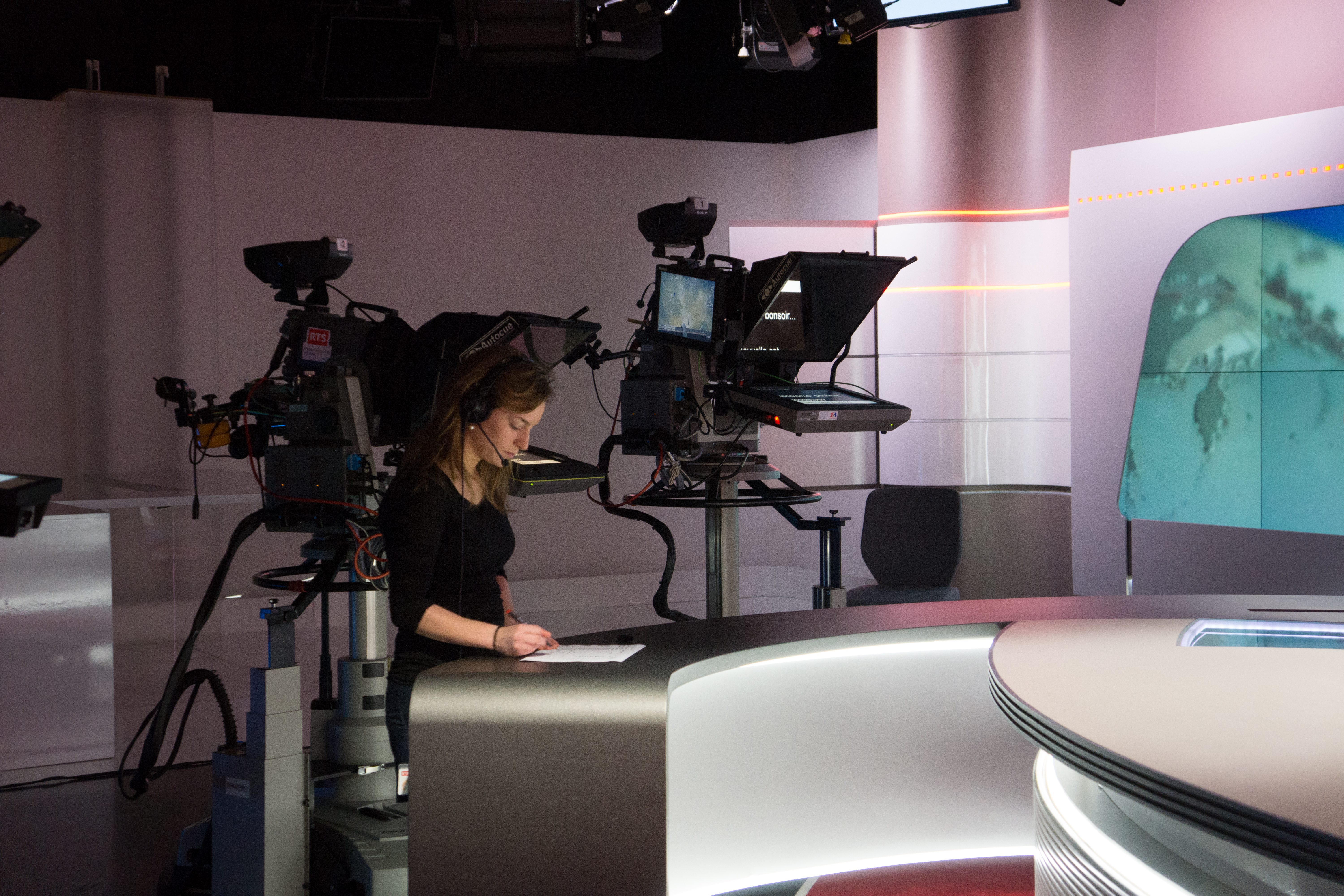 Studio de journal télévisé.